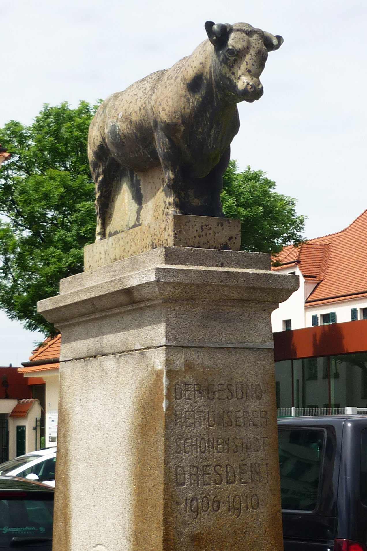 Skulptur Stierbrunnen am ehem. Schlachthof in Dresden